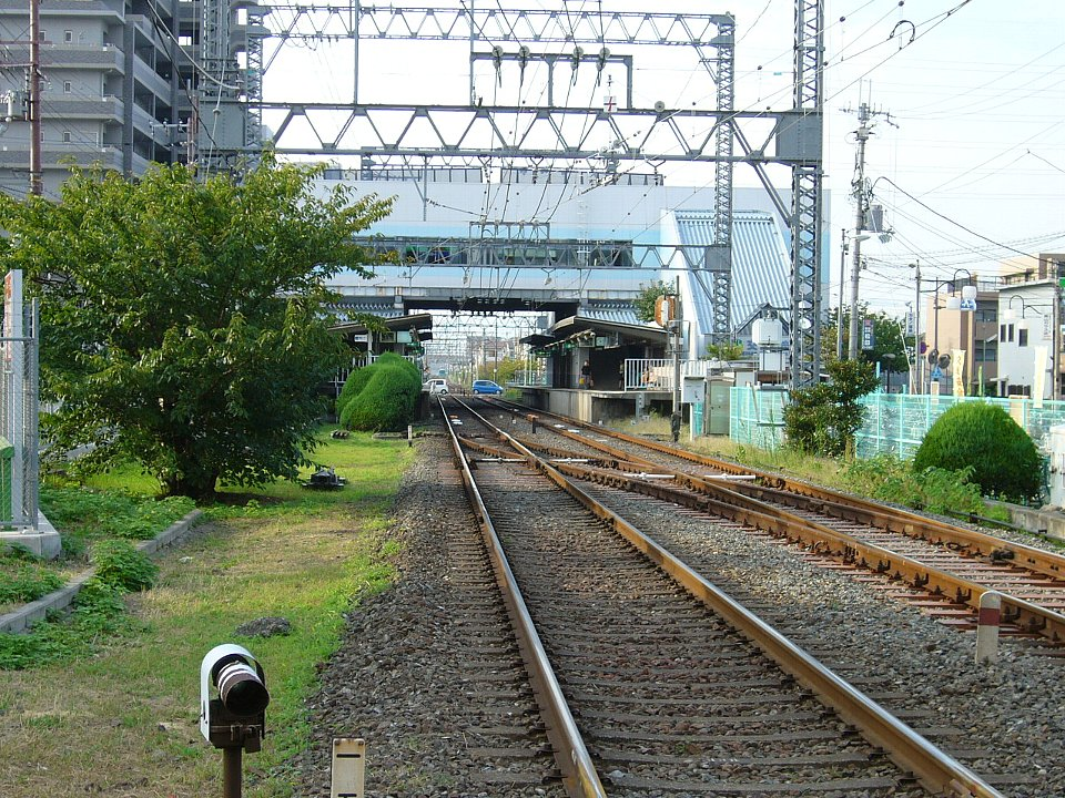 交野市駅 駅構内 駅南方の踏切から北望 2006年9月29日 Bakkai撮影